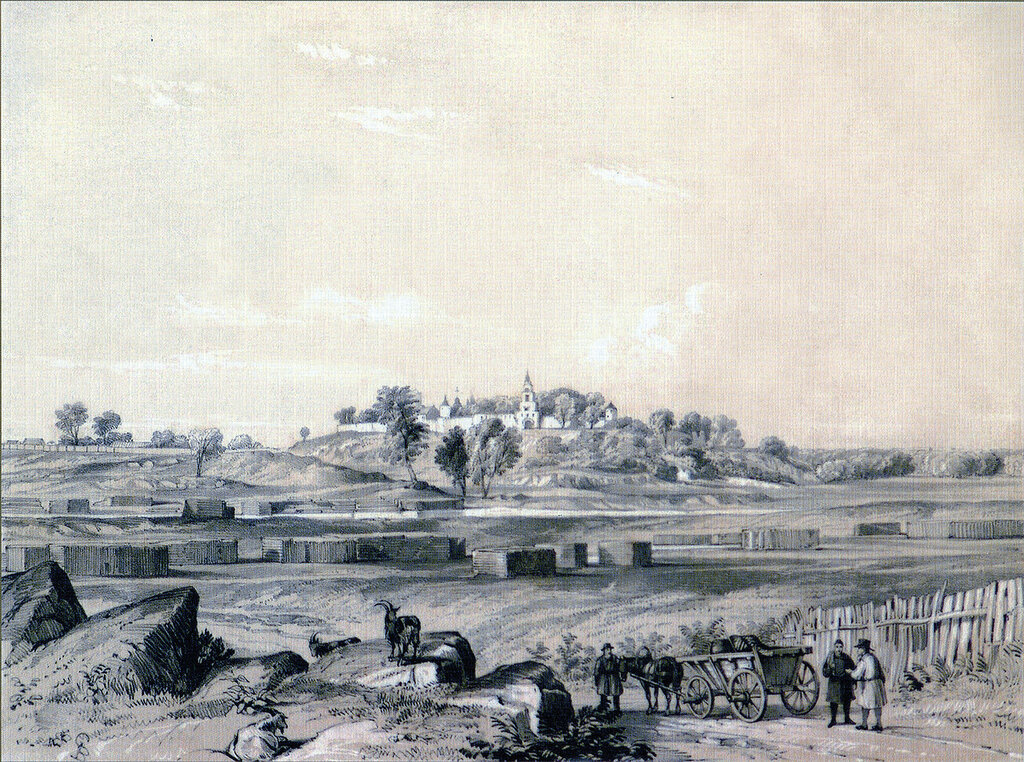 Зилантов монастырь. Из альбома: Виды Казани, рисованные с натуры Эдвардом Турнерелли. — Лондон, 1839.